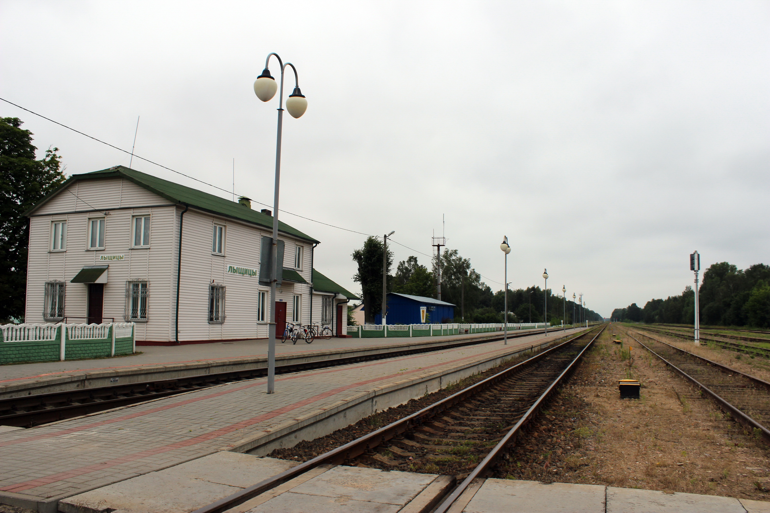 Станцыя Лышчыцы